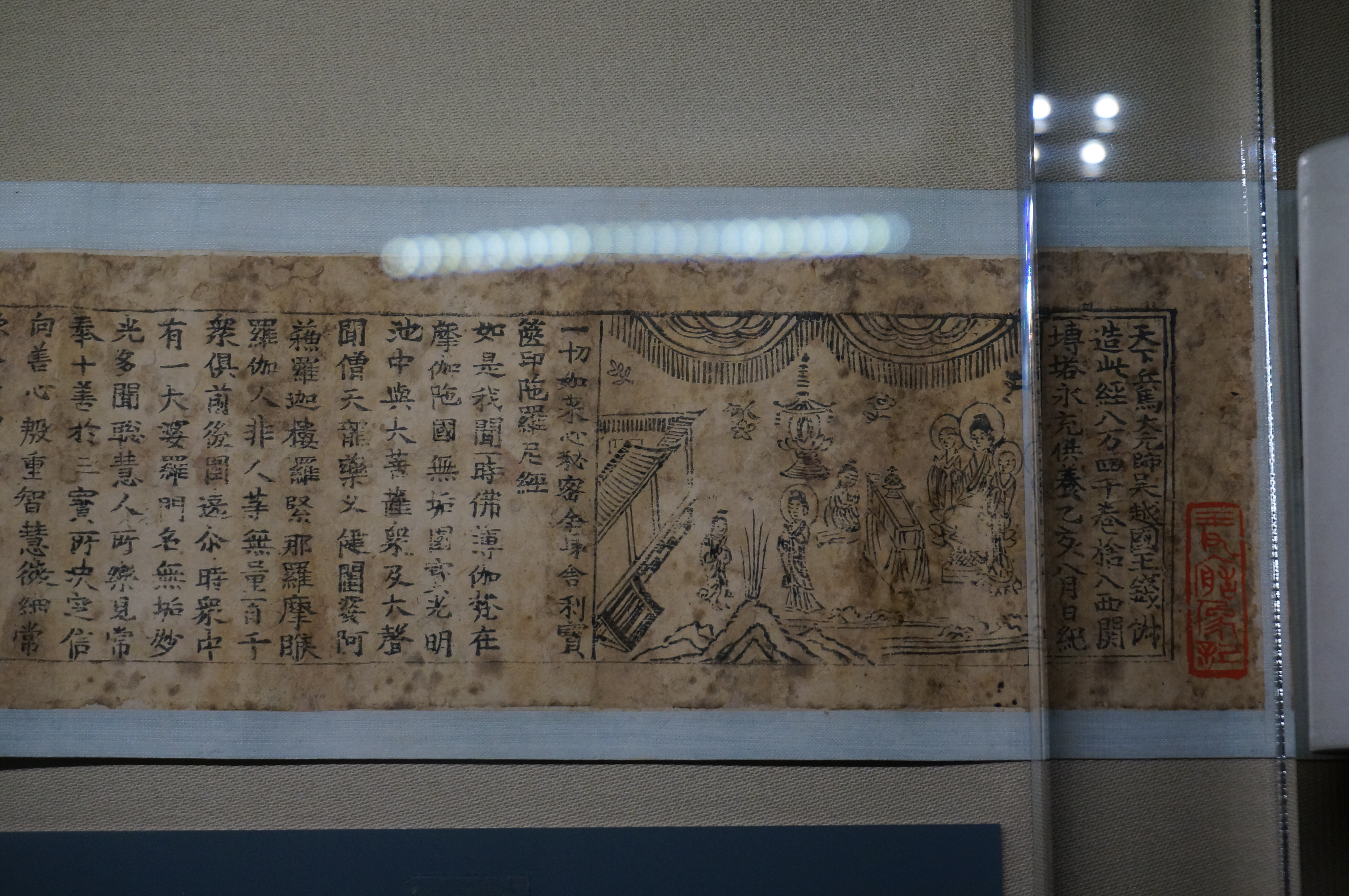 刻本《一切如来心秘密全身舍利宝箧印陀罗尼经》，雷峰塔遗址出土，现藏浙江省博物馆孤山馆舍。